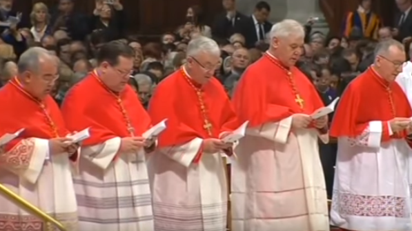 Cardenales